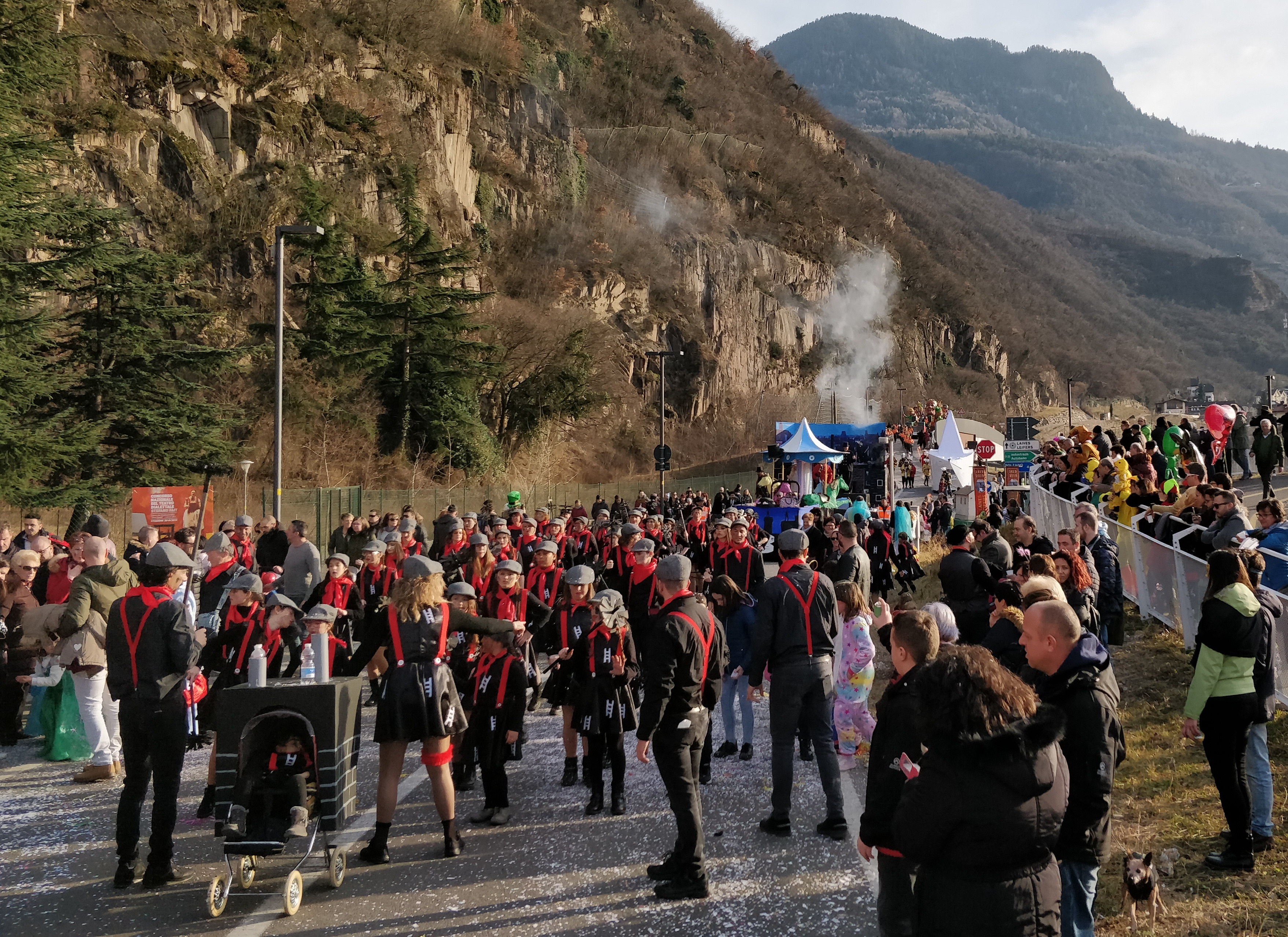 L'arrivo di alcuni carri allegorici del carnevale di Laives dal capoluogo nella frazione di Pineta This photo has been taken in the country: Italy